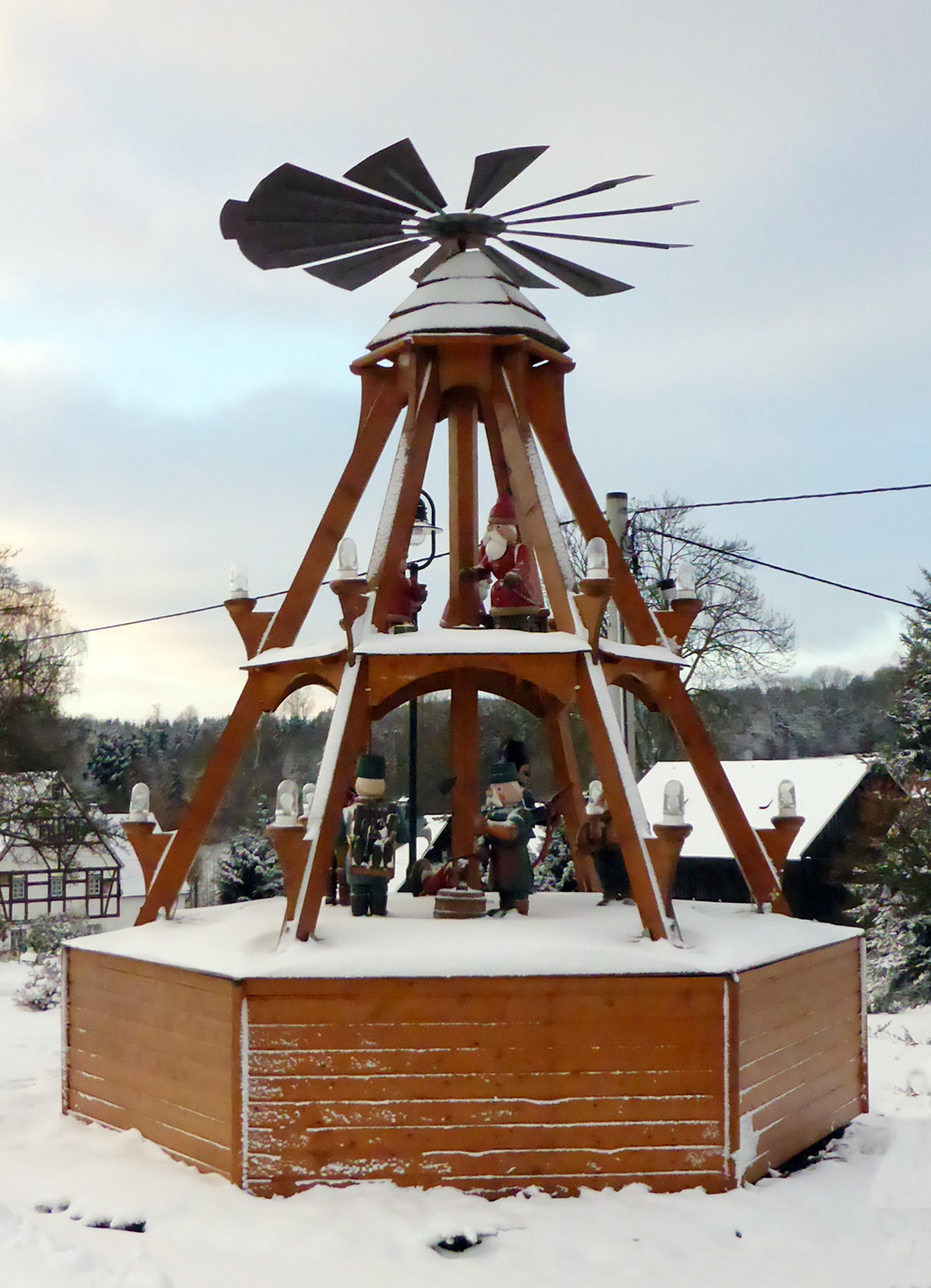 Ortspyramide in Dörnthal (Pfaffroda), Erzgebirgskreis - Sachsen.